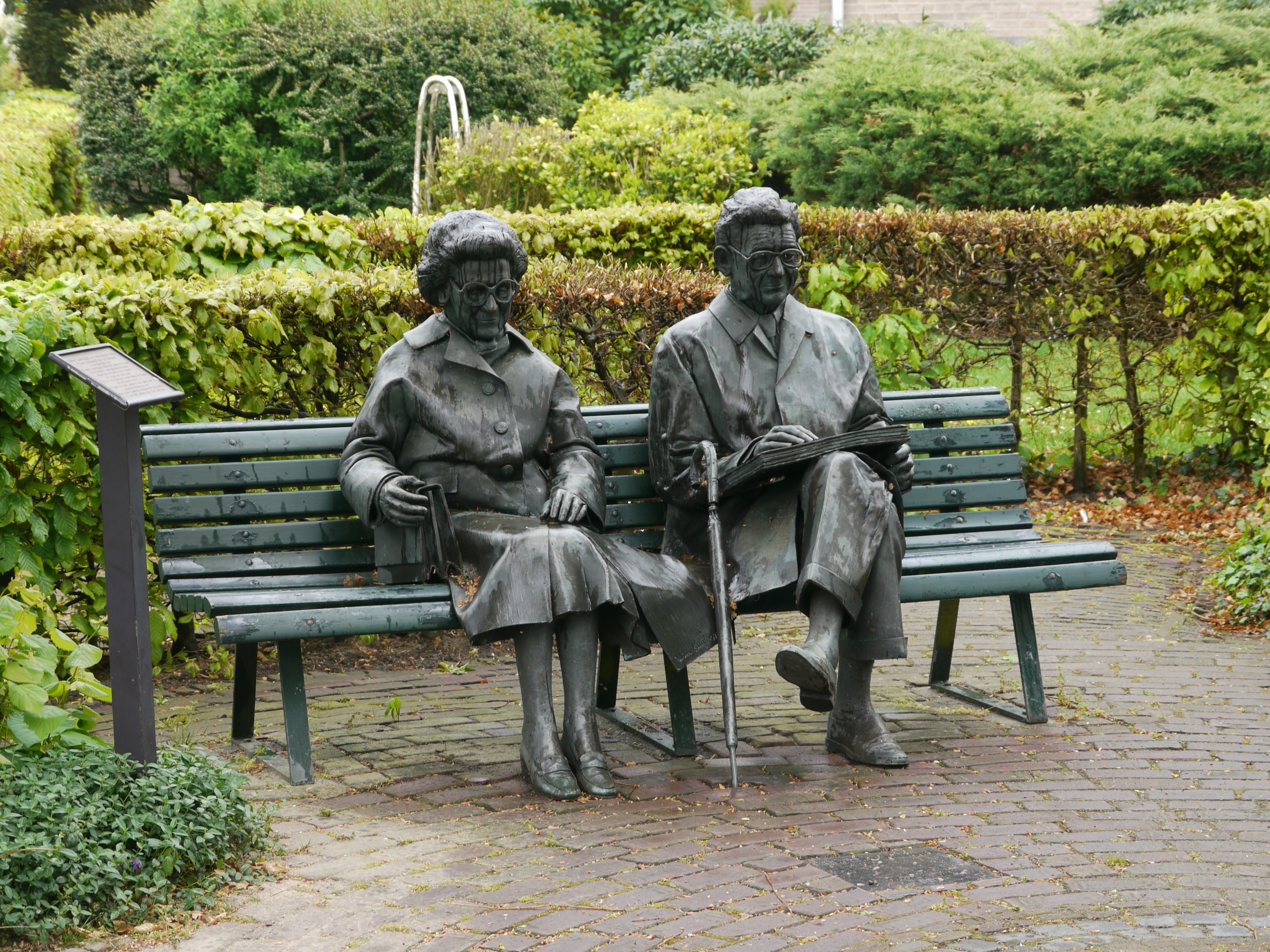 Beeld van Simon Carmiggelt en echtgenote Tiny, tegenover het gemeentehuis van gemeente Rheden: Hoofdstraat in De Steeg. Naast het beeld staat een plaquette met daarop de tekst: Beeld van Simon Carmiggelt en echtgenote Tiny. In brons vereeuwigd door de Rhedense kunstenaar Wim Kuyl. De auteur Carmiggelt (1913-1987) schetste in zijn humoristische, melancholieke kronkels (dagelijkse columns in Het Parool) de dingen om hem heen. Simon en Tiny Carmiggelt beschouwden De Steeg als hun tweede thuis. Het beeld, tot stand gekomen door giften van de gemeente Rheden en het Cultuurfonds bouwfonds Nederlandse Gemeenten is 15 juni 1990 onthuld door Tiny Carmiggelt. Op 22 januari 2012 bleek dat dit beeld gestolen was. Op 25 januari werd het in schuren in de buurt teruggevonden, in ongeveer 100 stukken gezaagd. Wim Kuijl restaureerde het beeld, financieel ondersteund door een speciaal daarvoor in het leven geroepen stichting. Het herstelde beeld werd op 23 januari 2013 ingehuldigd op de oorspronkelijke plek.